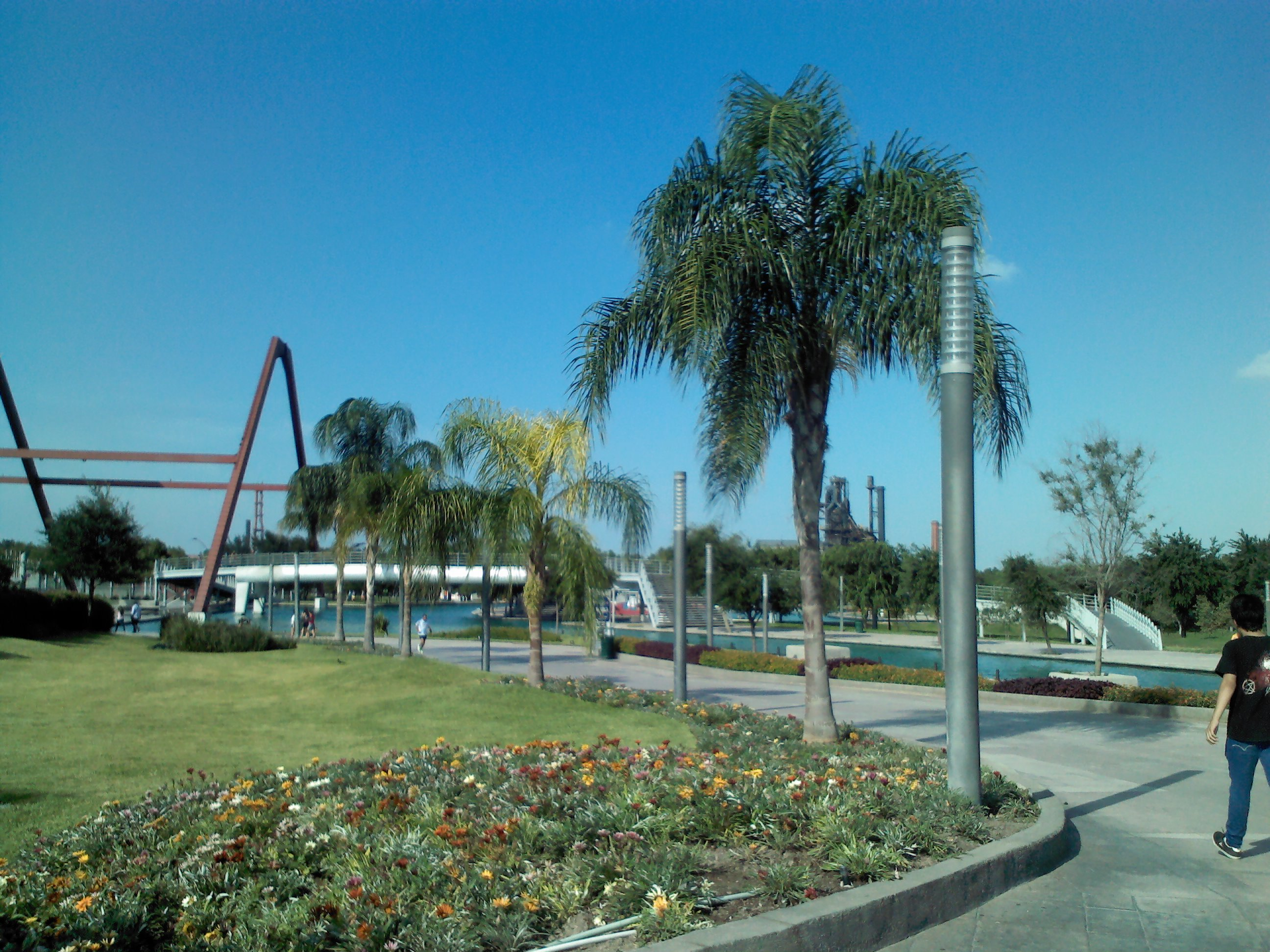 Paseo Santa Lucia.